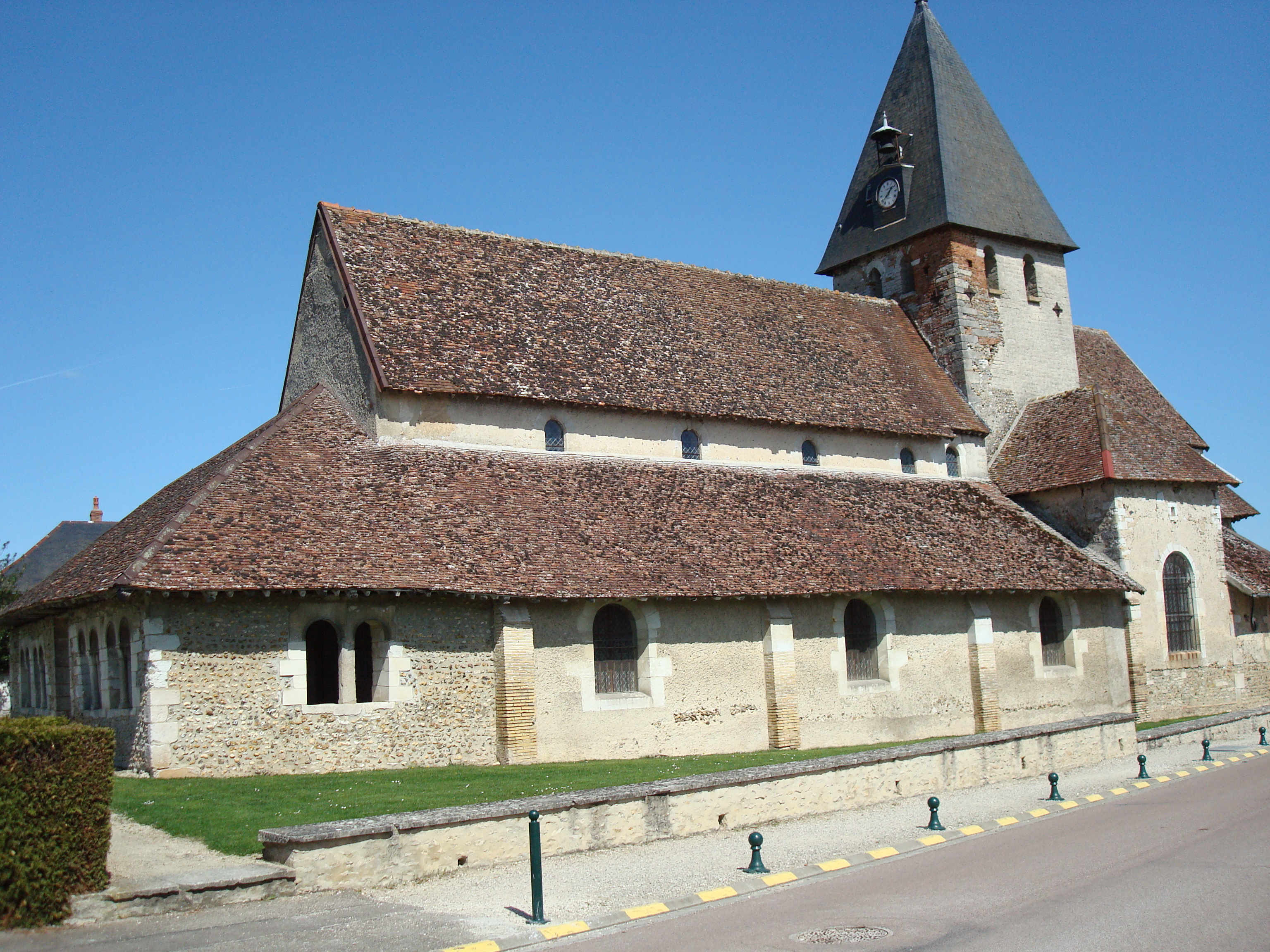 Eglise romane de Moussey (Aube)